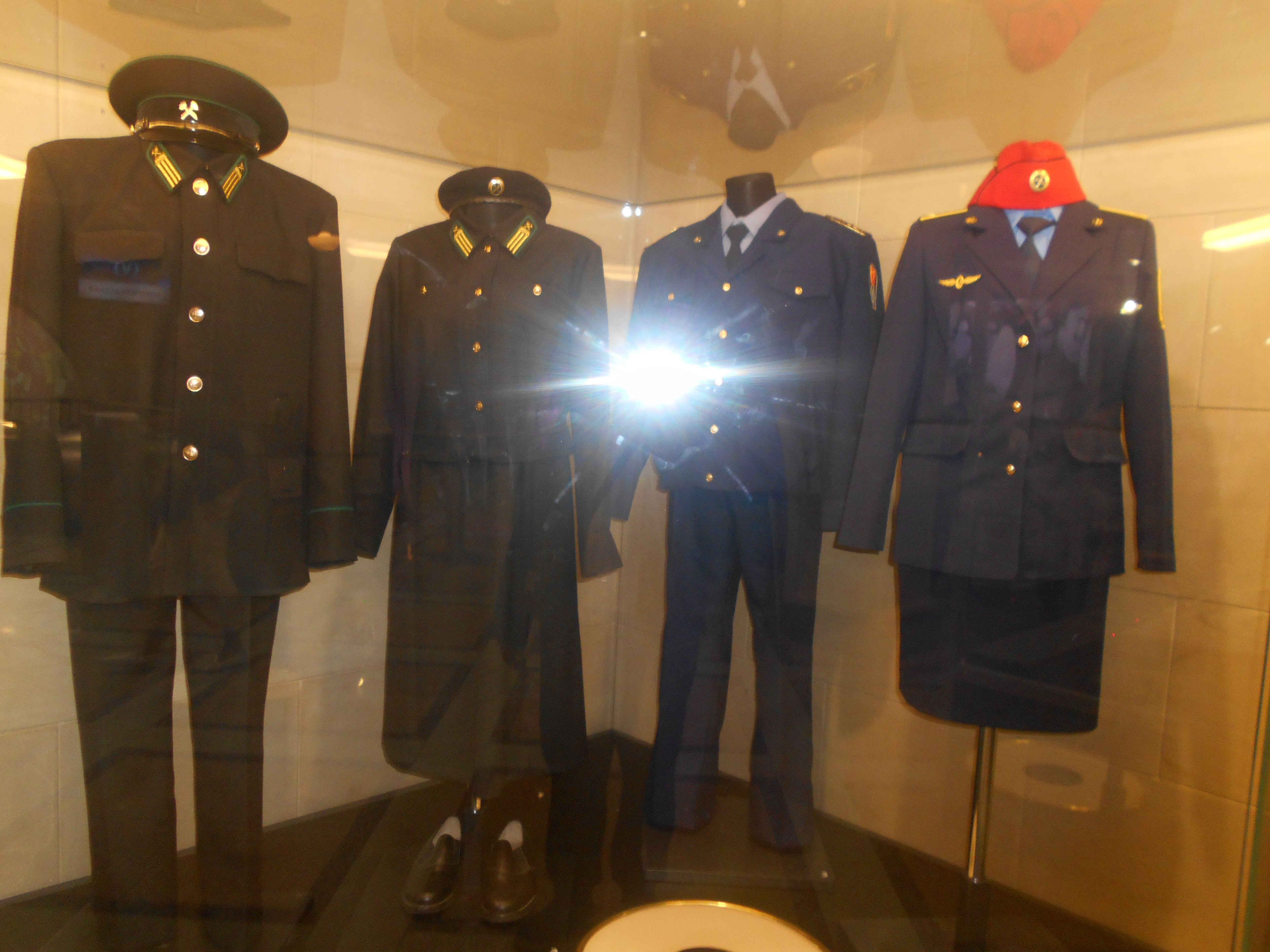 Экспо